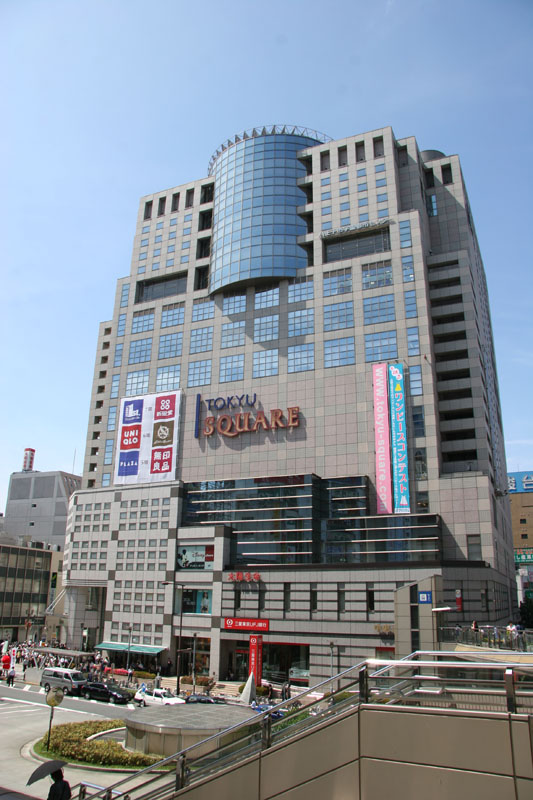 Hachioji Tokyu Square in Hachioji, Tokyo, Japan